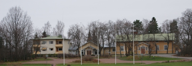 Valokuva Lapinjärven kunnantalosta.